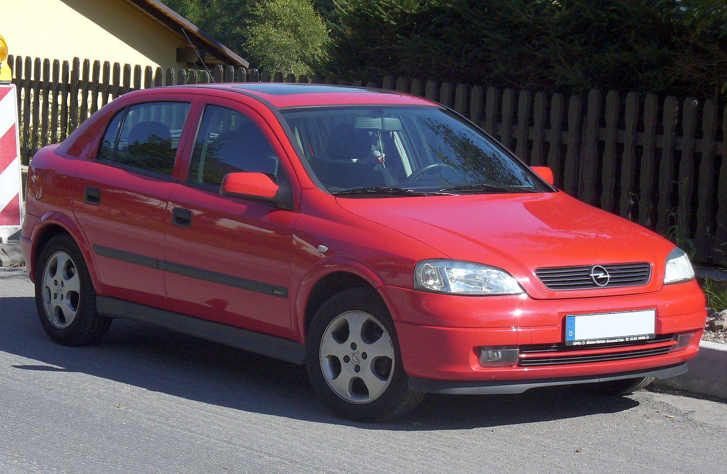 Opel Astra G five-doors